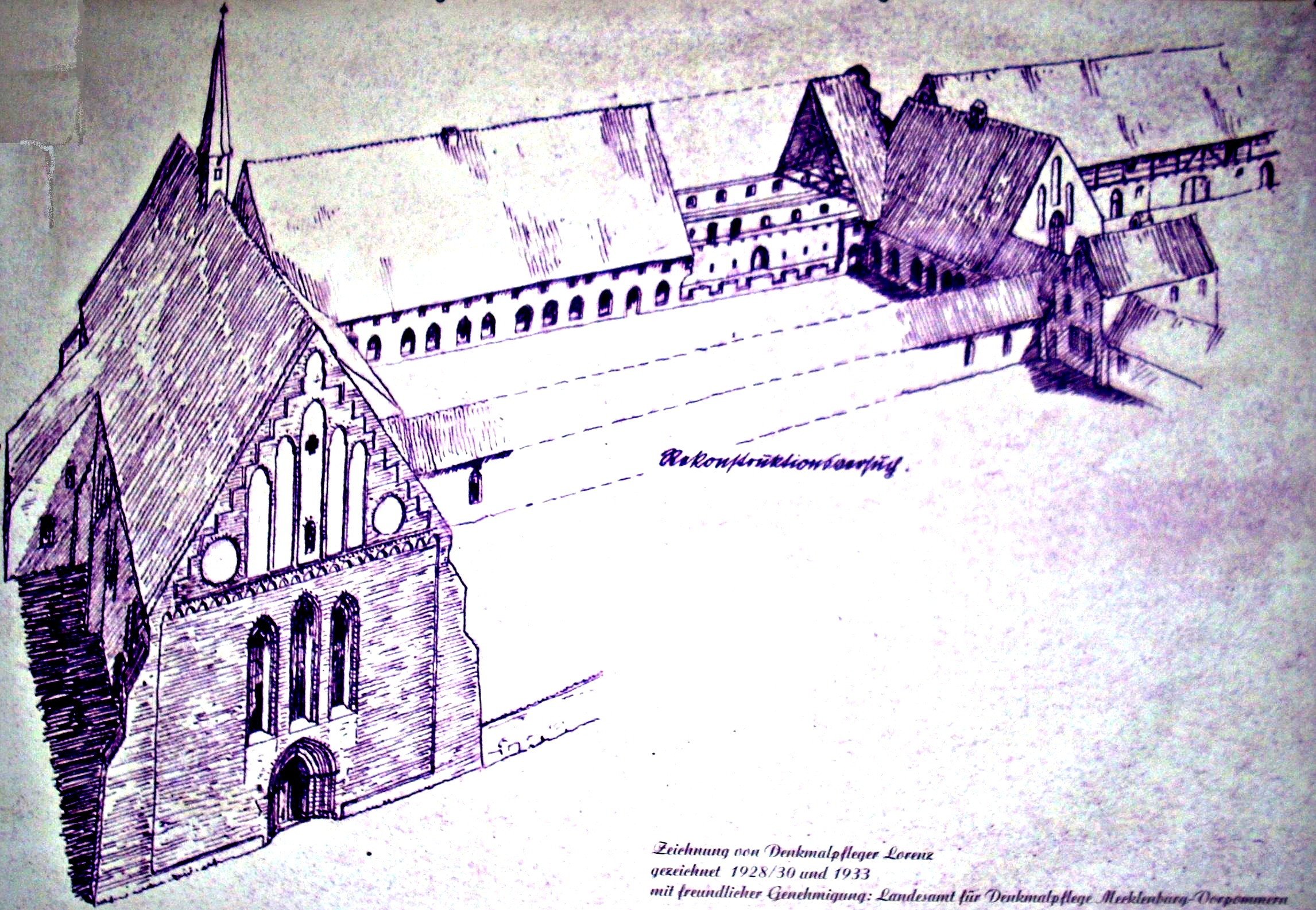 Rekonstruktion des Klosters Rühn; own work. Quelle: Lorenz 1928-30,1933, gemeinfrei durch Panoramafreiheit